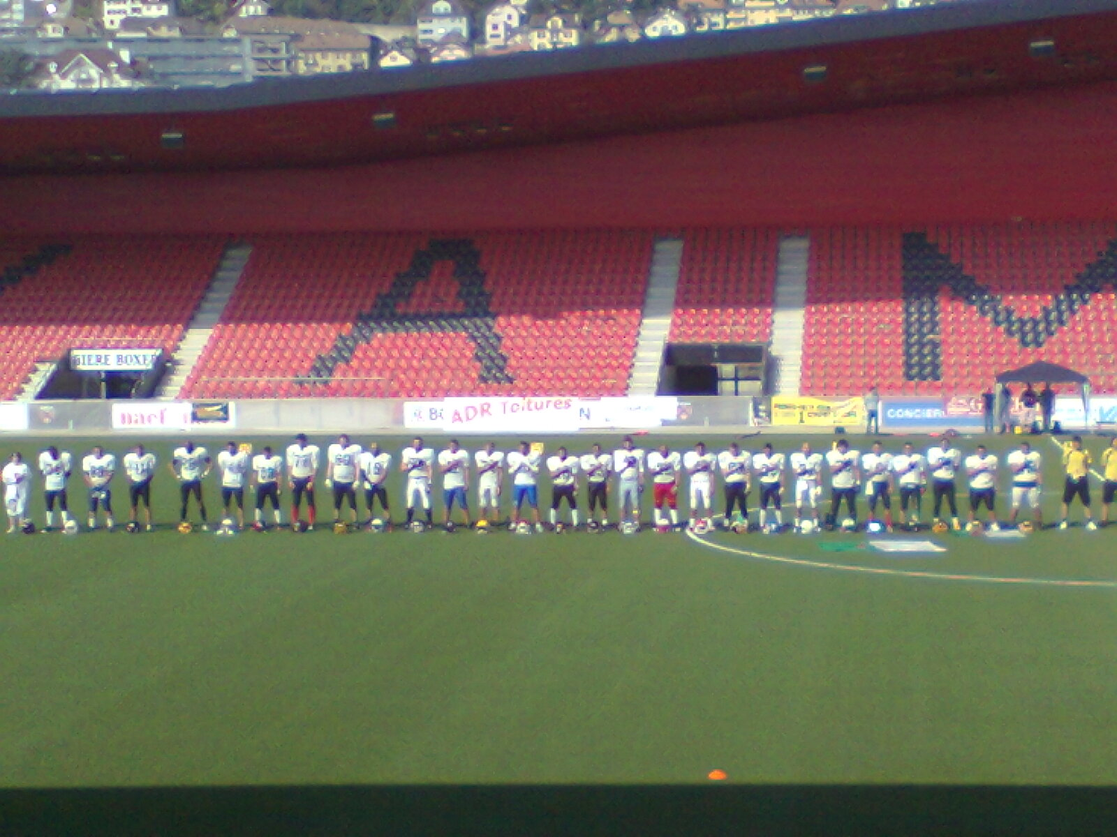 Algerie foot us